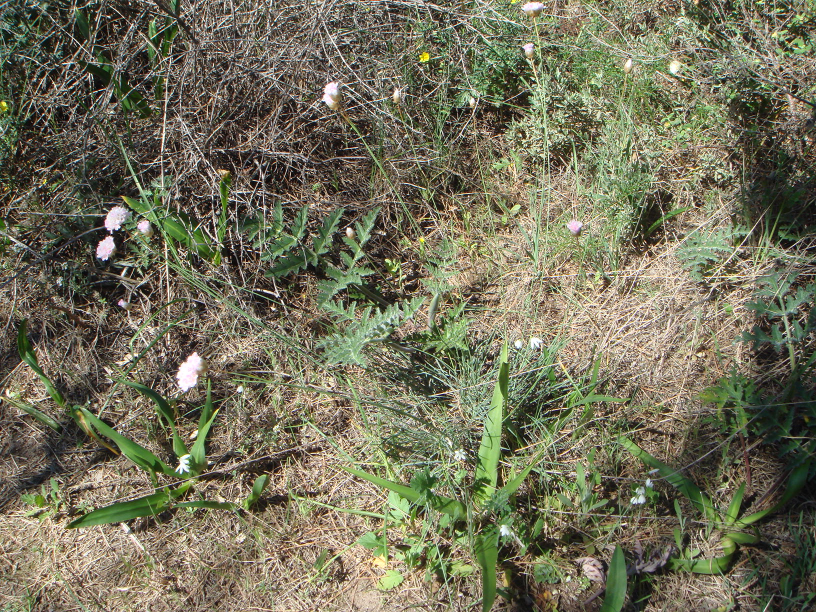 Armeria macrophylla, Chiclana, Cádiz, España